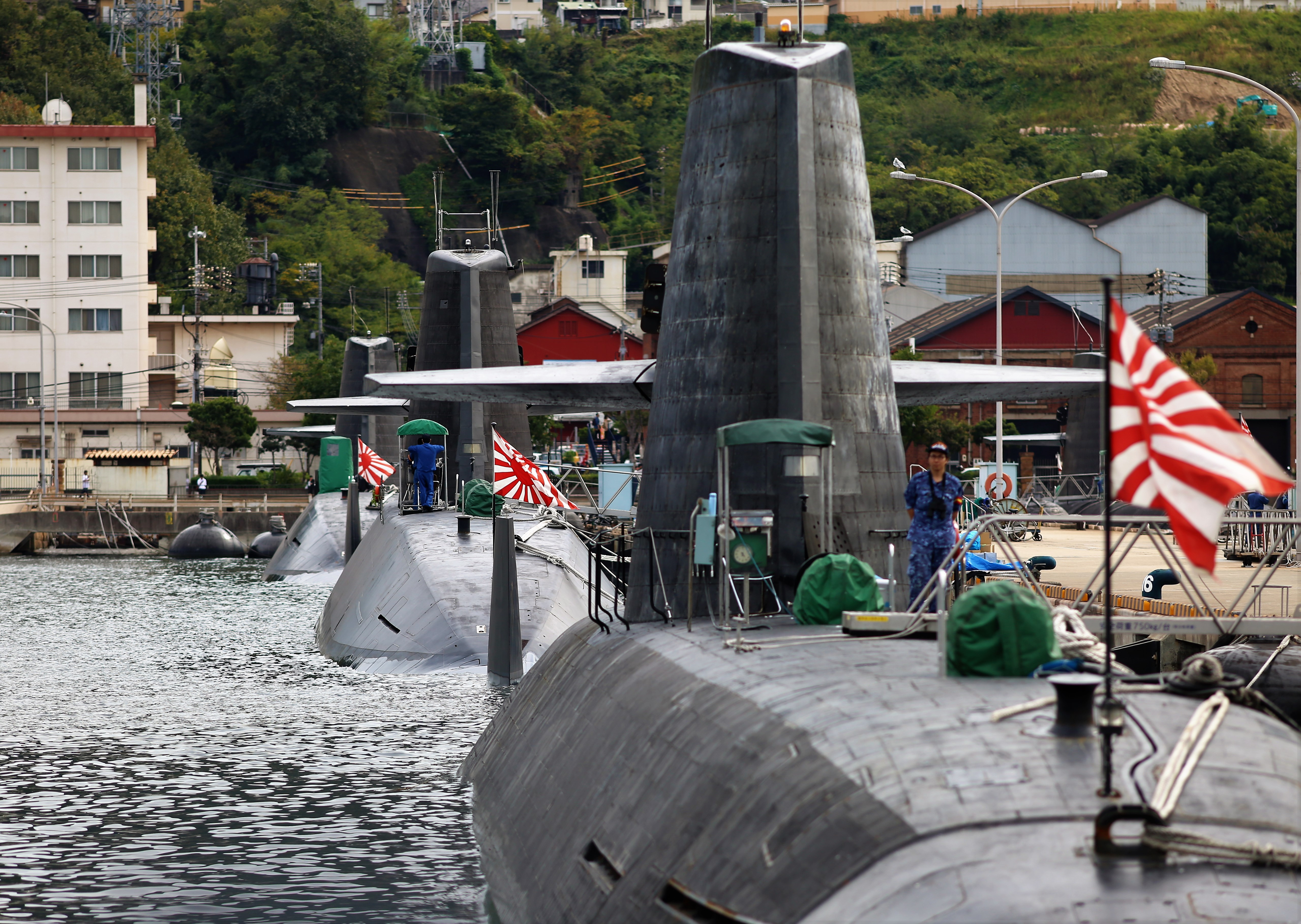 海上自衛隊呉基地に停泊する「そうりゅう」型潜水艦。2019年の撮影。奥は「おやしお」型潜水艦。艦名は不詳。左手のビルは、海上自衛隊 潜水艦教育訓練隊の建物。右手の赤レンガの建物は「アレイからすこじま」の旧日本海軍建築物群で「昭和町れんが倉庫群」と呼ばれる。現在は民間の倉庫や商店として使用されている。